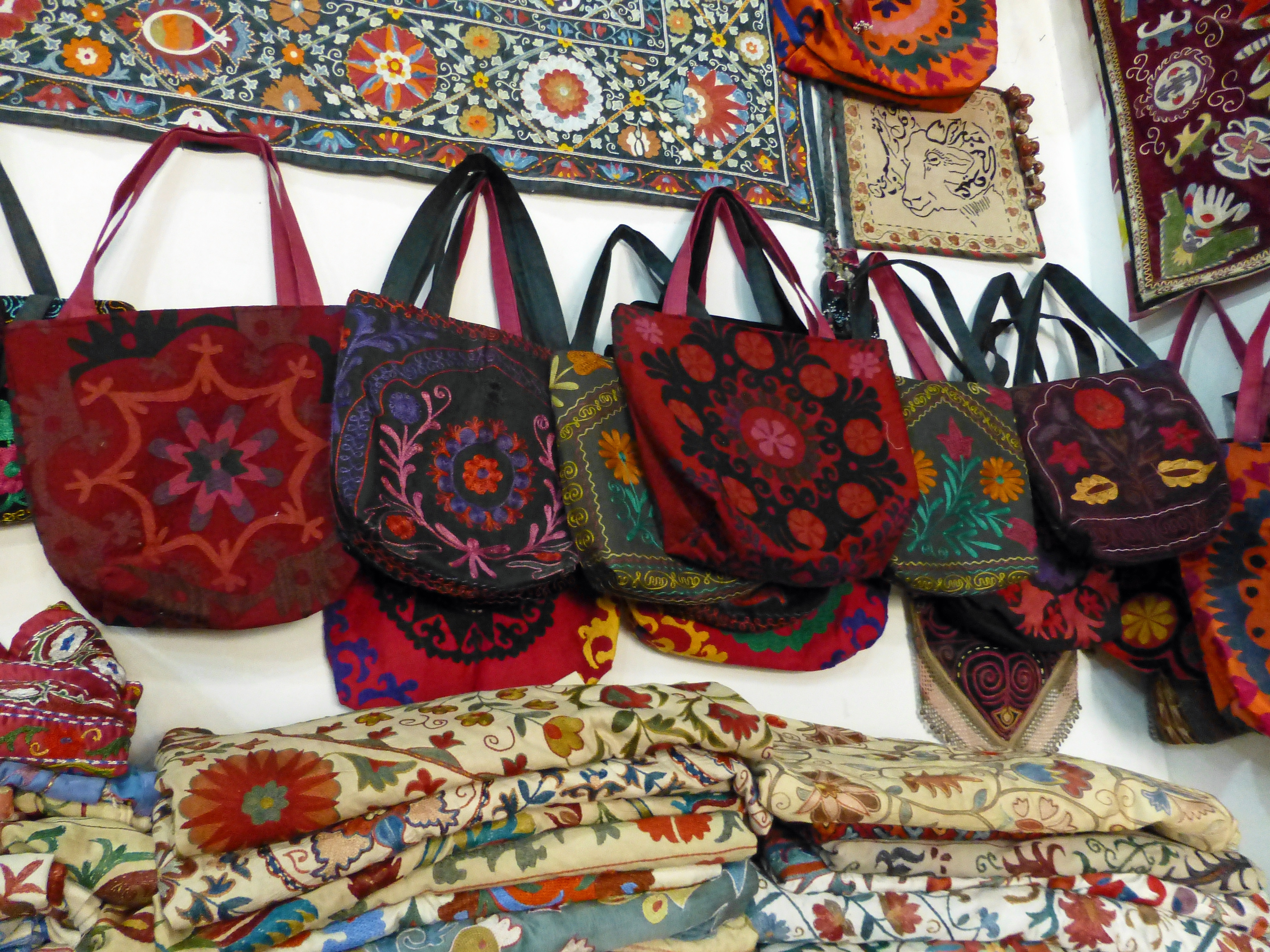 Atelier de broderie à Boukhara (Ouzbékistan) : sacs de type suzani